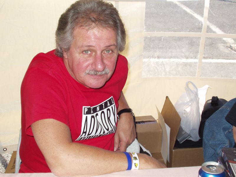 Ex-Beatles drummer Pete Best